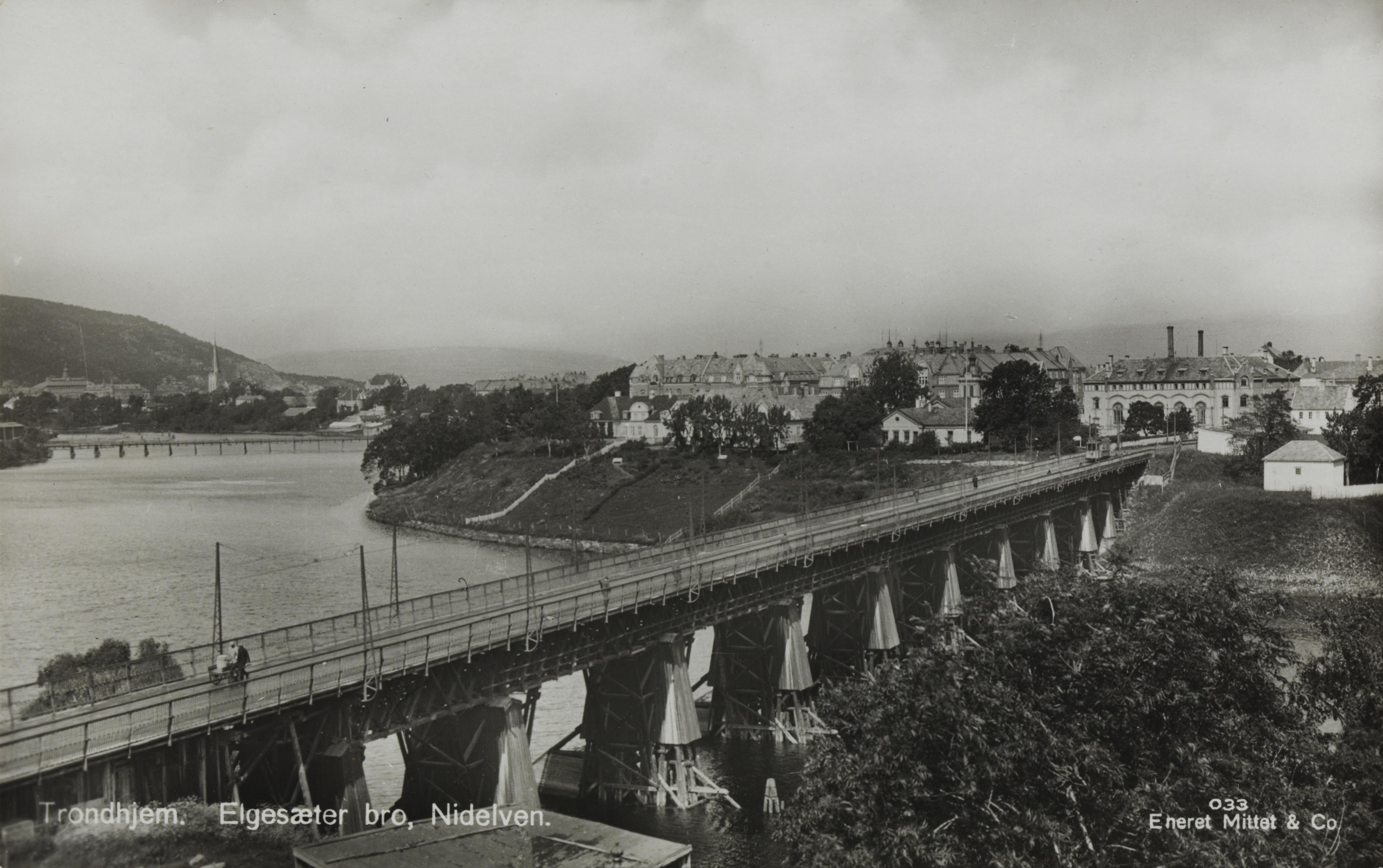 Bildet er hentet fra Nasjonalbibliotekets bildesamling Elgeseter bru, Trondheim, Sør Trøndelag